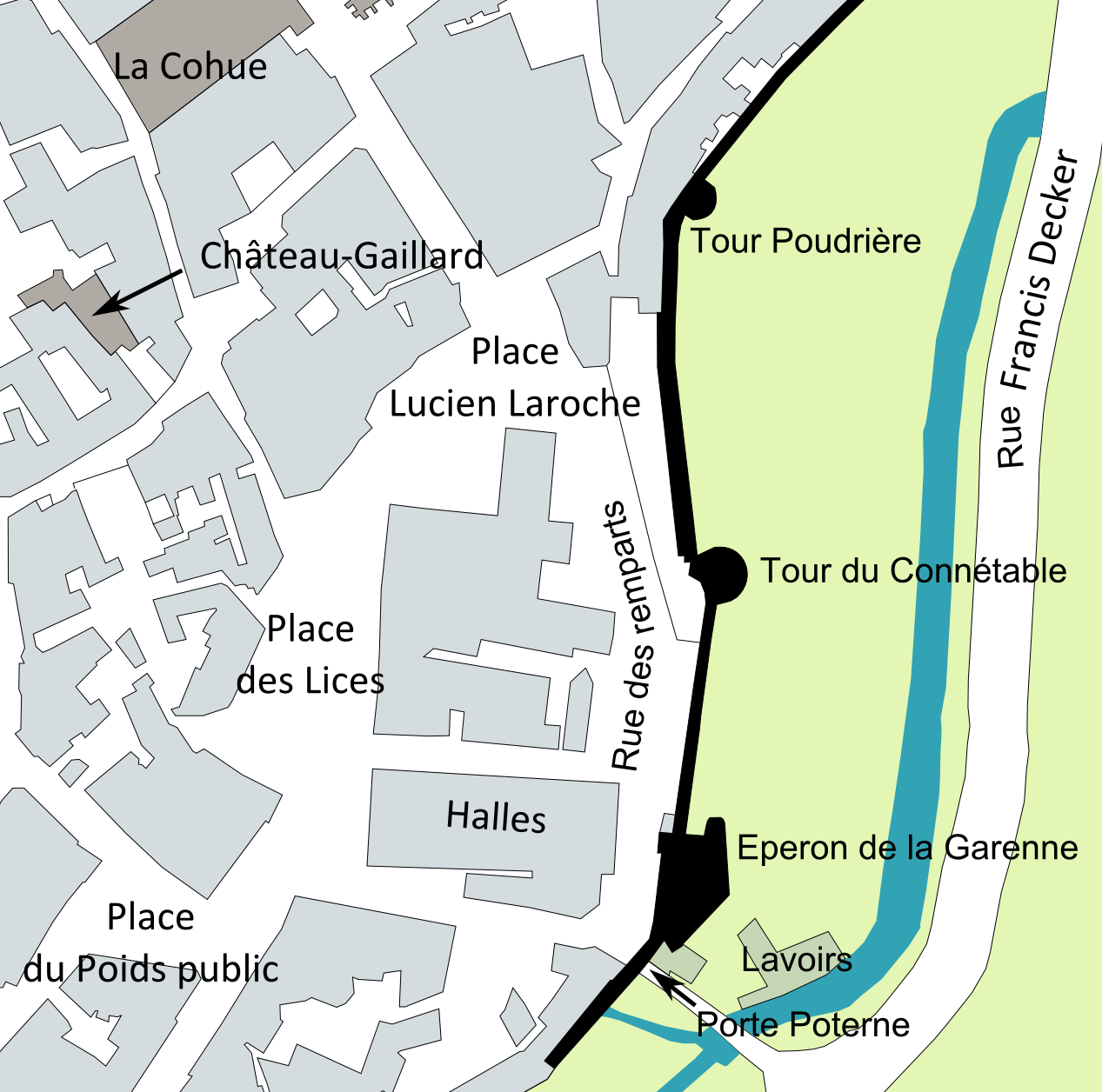 Plan de l'intra-muros et des remparts de Vannes - partie EST